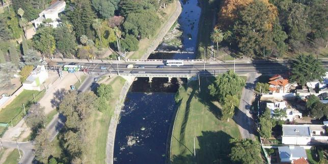 Foto aérea de arroyo Miguelete, Aires Puros.